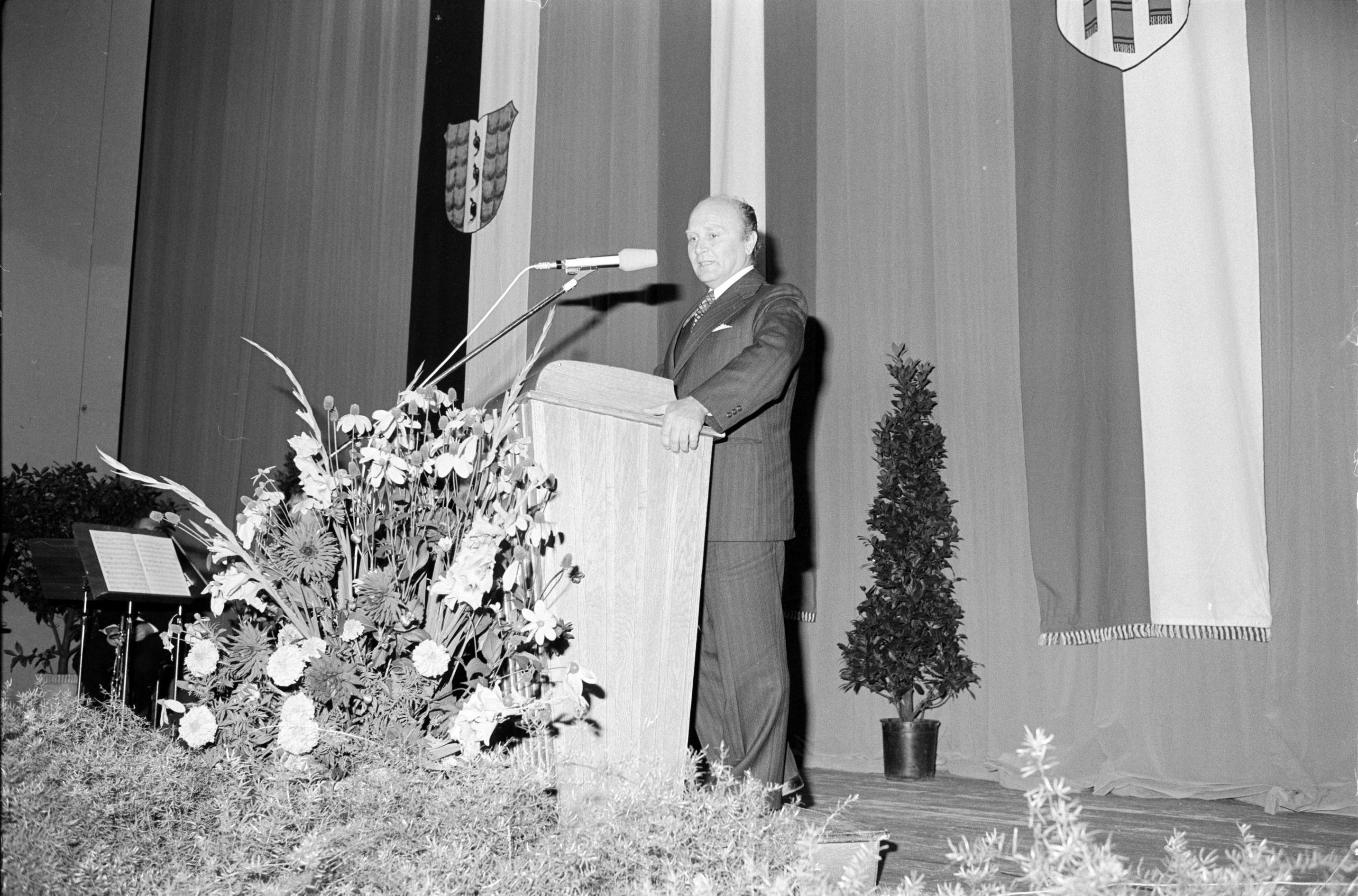 Der Bregenzer Bürgermeister Fritz Mayer bei der Bibliothekartagung 1976 im Bregenzer Kornmarkttheater.